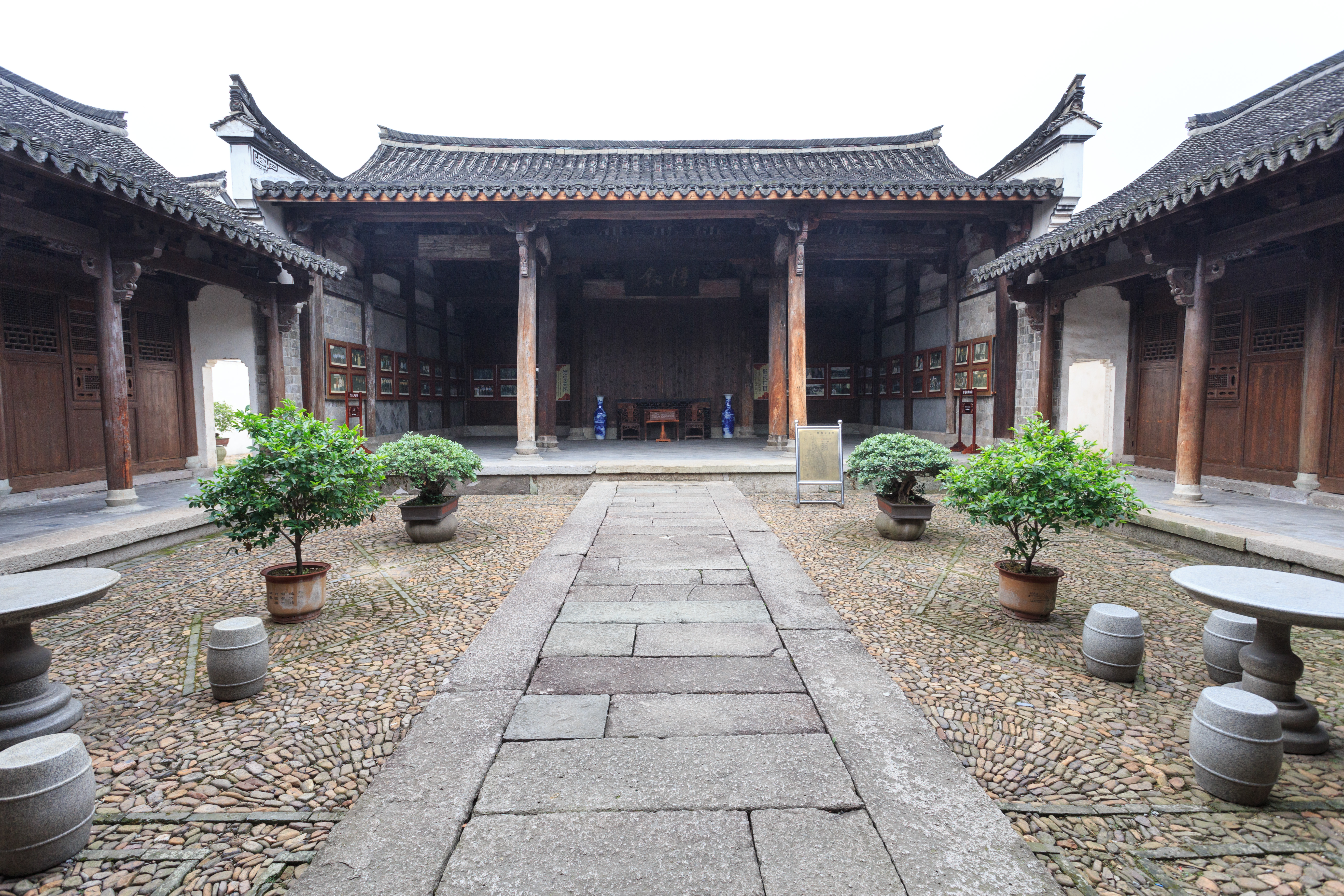 东阳卢宅—— 惇叙堂